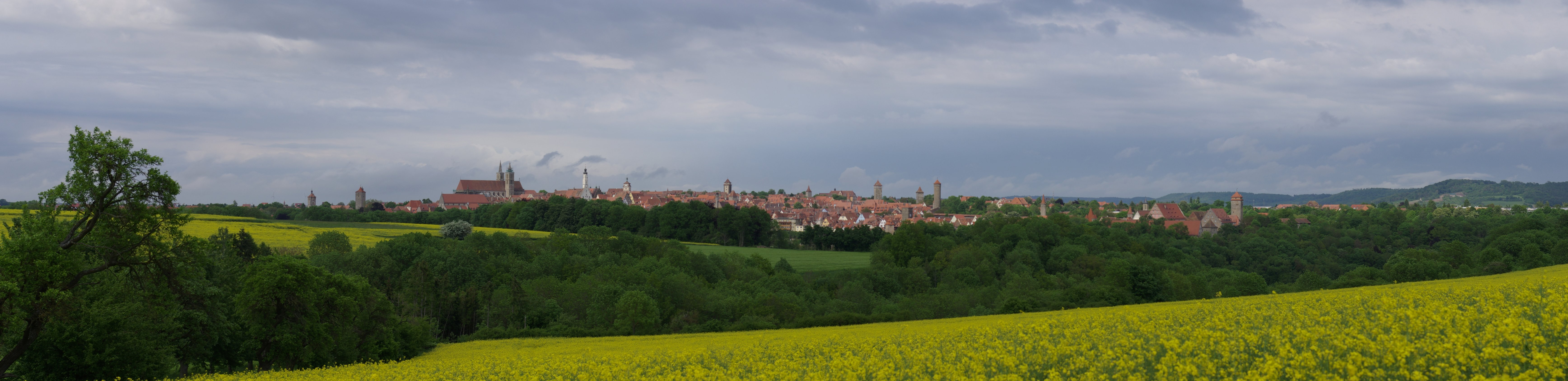 Panorama von Rothenburg ob der Tauber